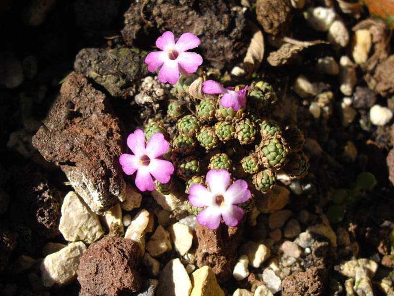 Dionysia bryoides